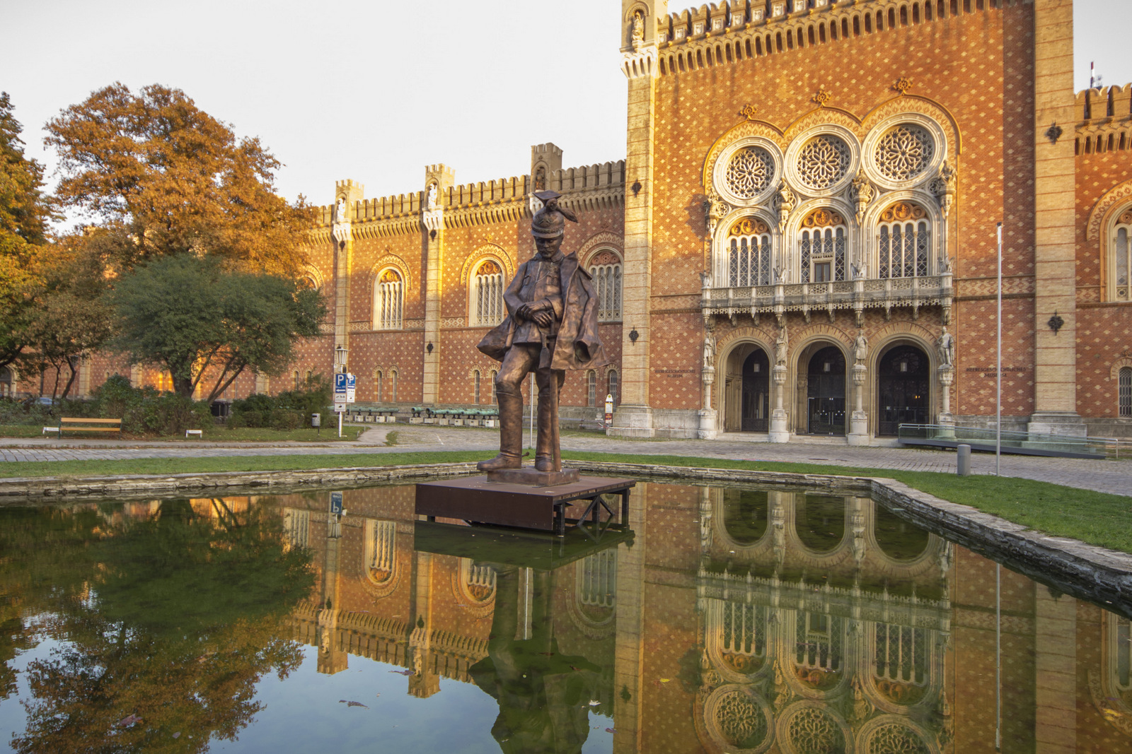 Skulptur von Arthur Kaan - k.u.k. Ulan - Auf Säbel gestützt / 1914 / 1915 Nachbildung